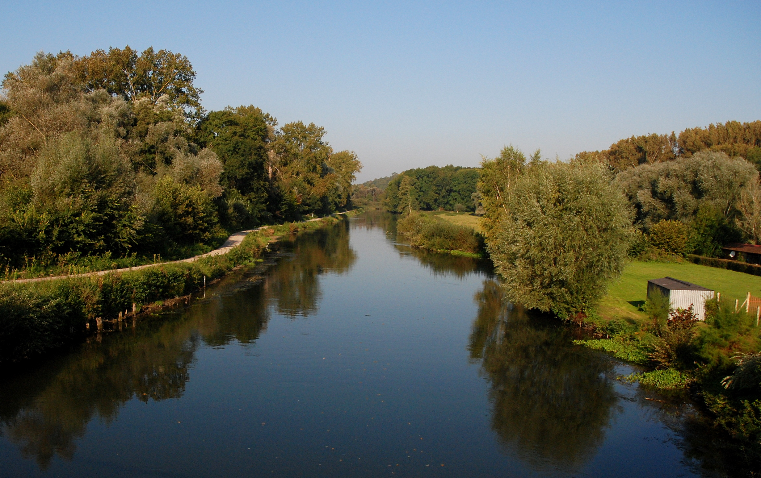 De Somme in L'Etoile